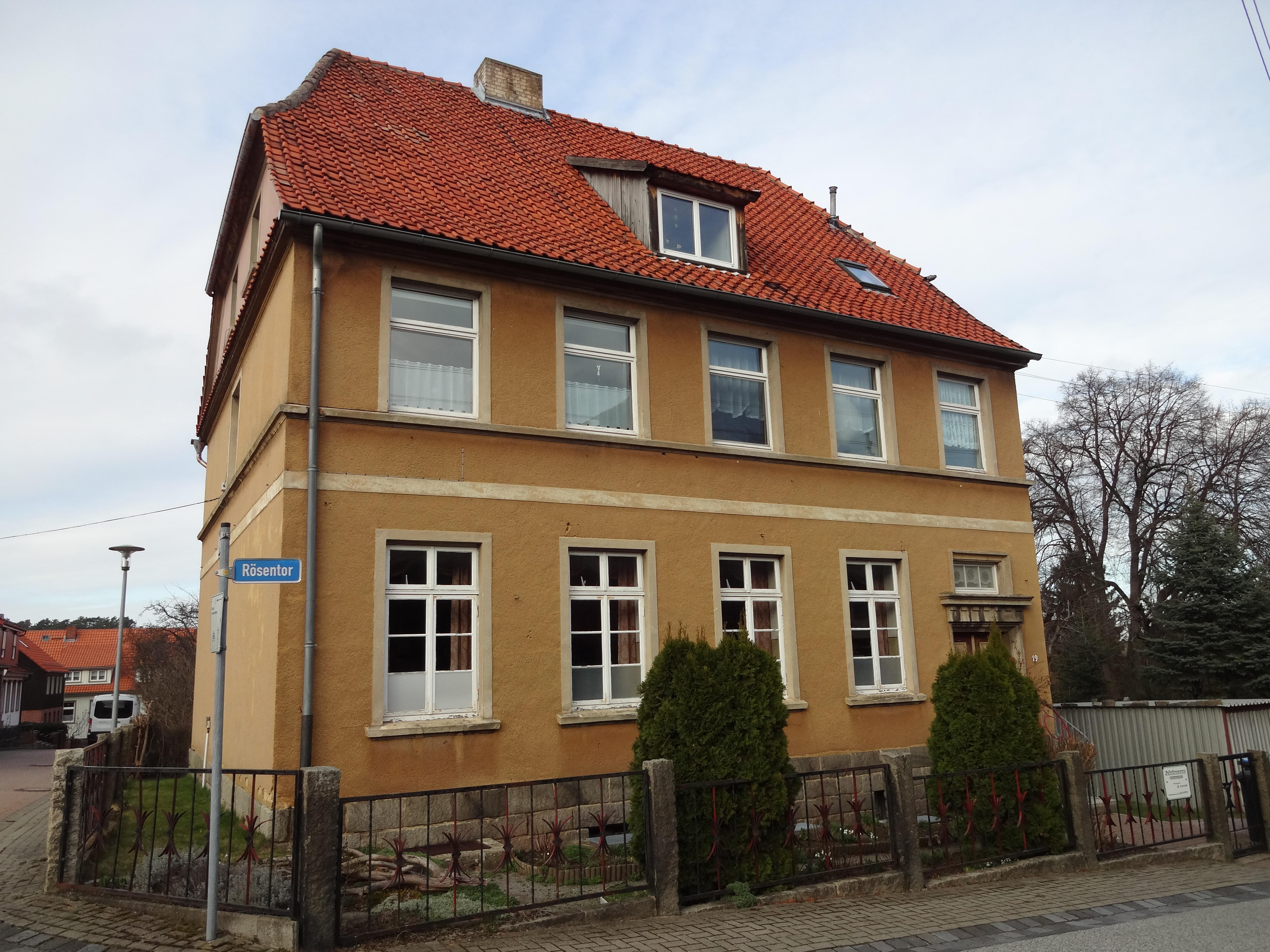 Denkmalgeschützte Schule in der Straße im Rösentor 19 in Benzingerode (Ortsteil von Wernigerode)